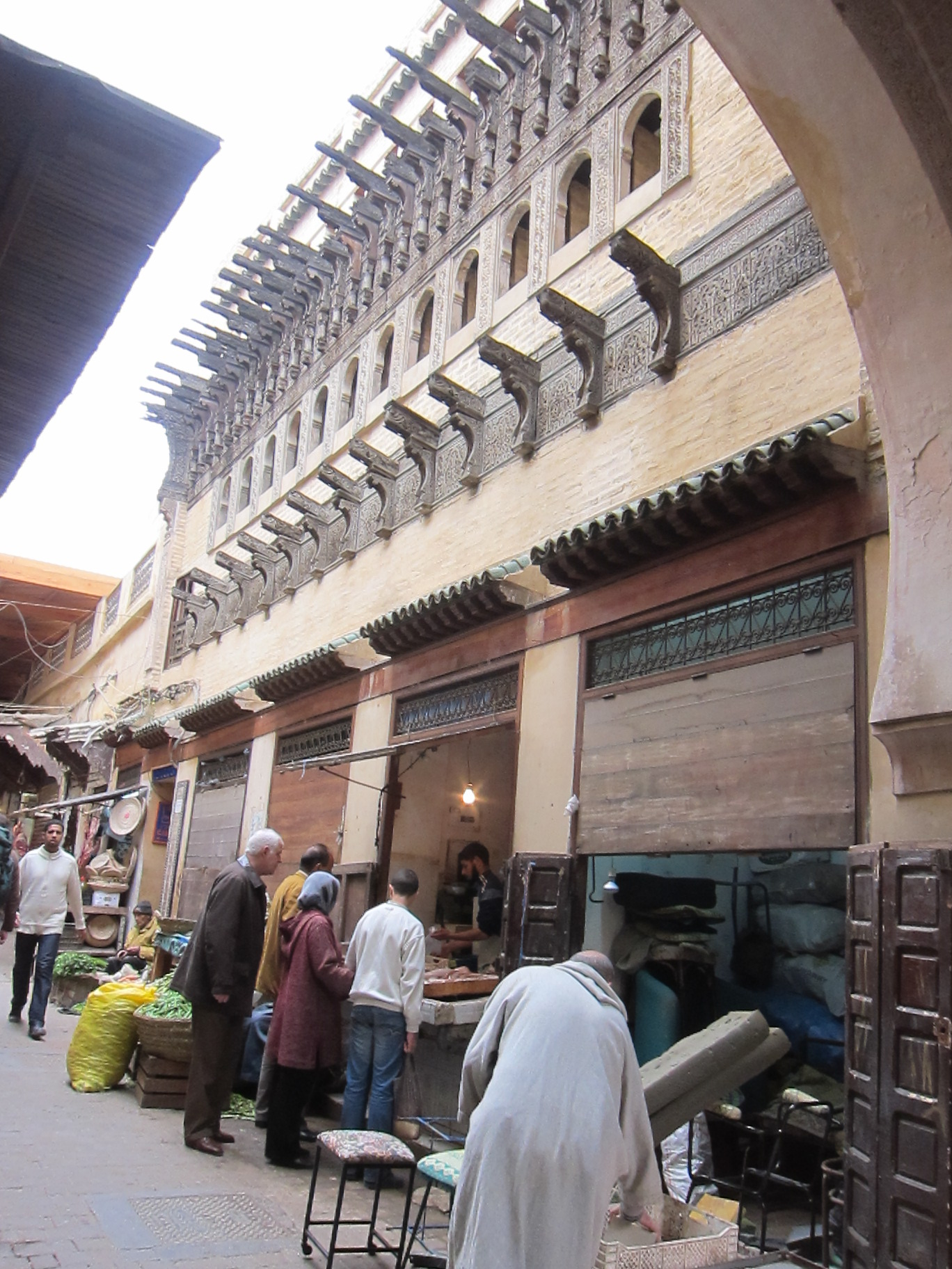 Clepsidra de Bou Inania